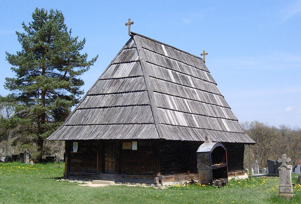 Wooden church in Pranjani, Serbia; Црква брвнара у Прањанима